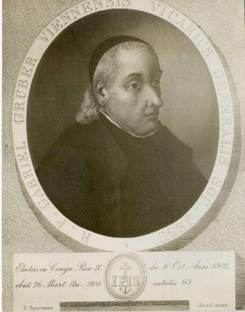 Gabrijel Gruber (1740-1805), Slovene architect.